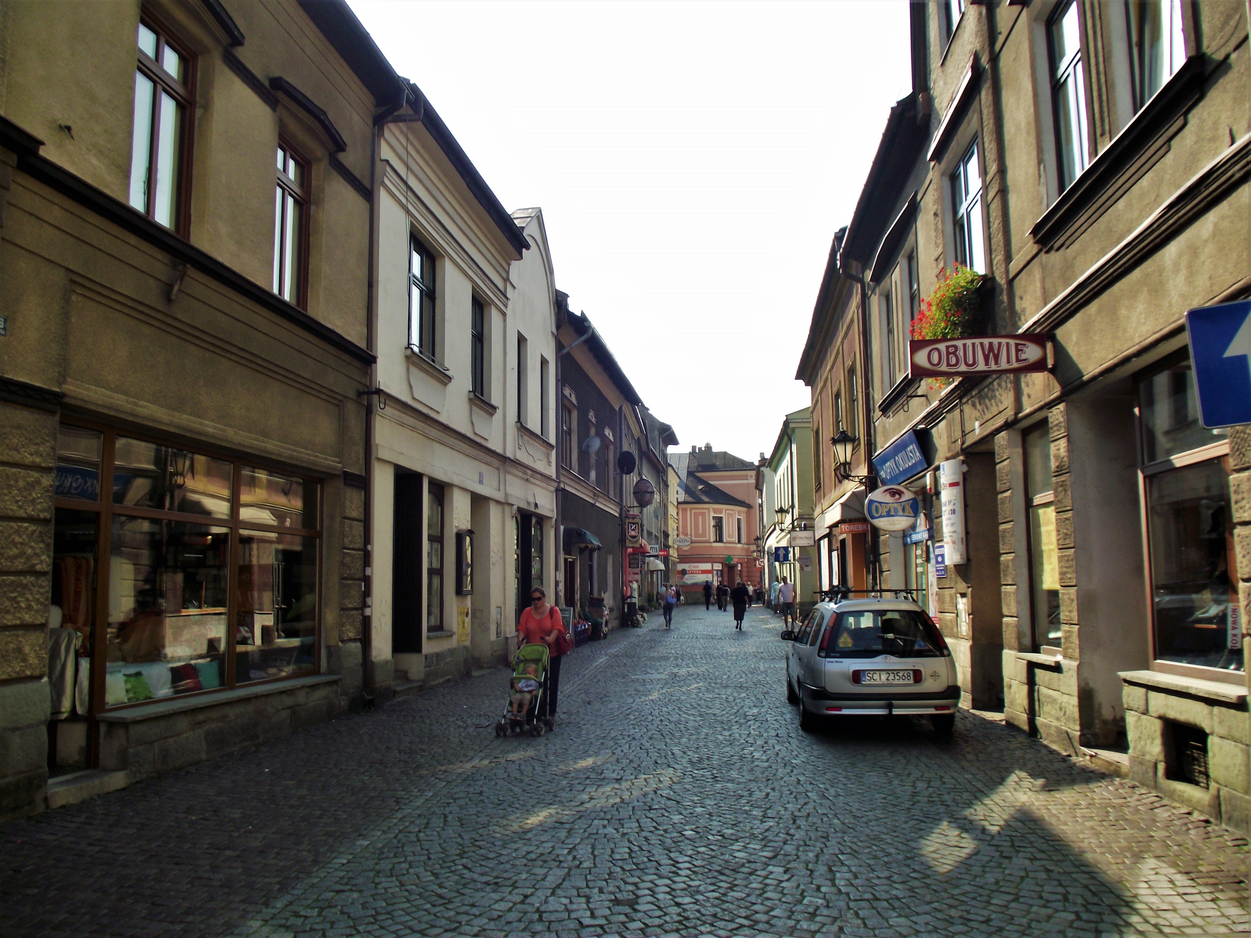 Skoczów – ulica Bielska.